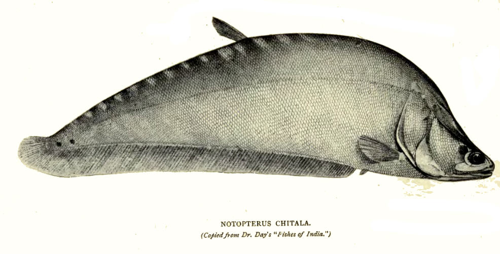 Notopterus chitala = Chitala chitala (Hamilton, 1822)